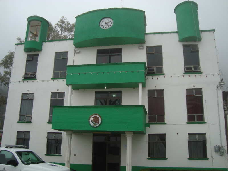 La foto montras la komunuman domon (administrejo) de la komunumo Nicolás Flores.